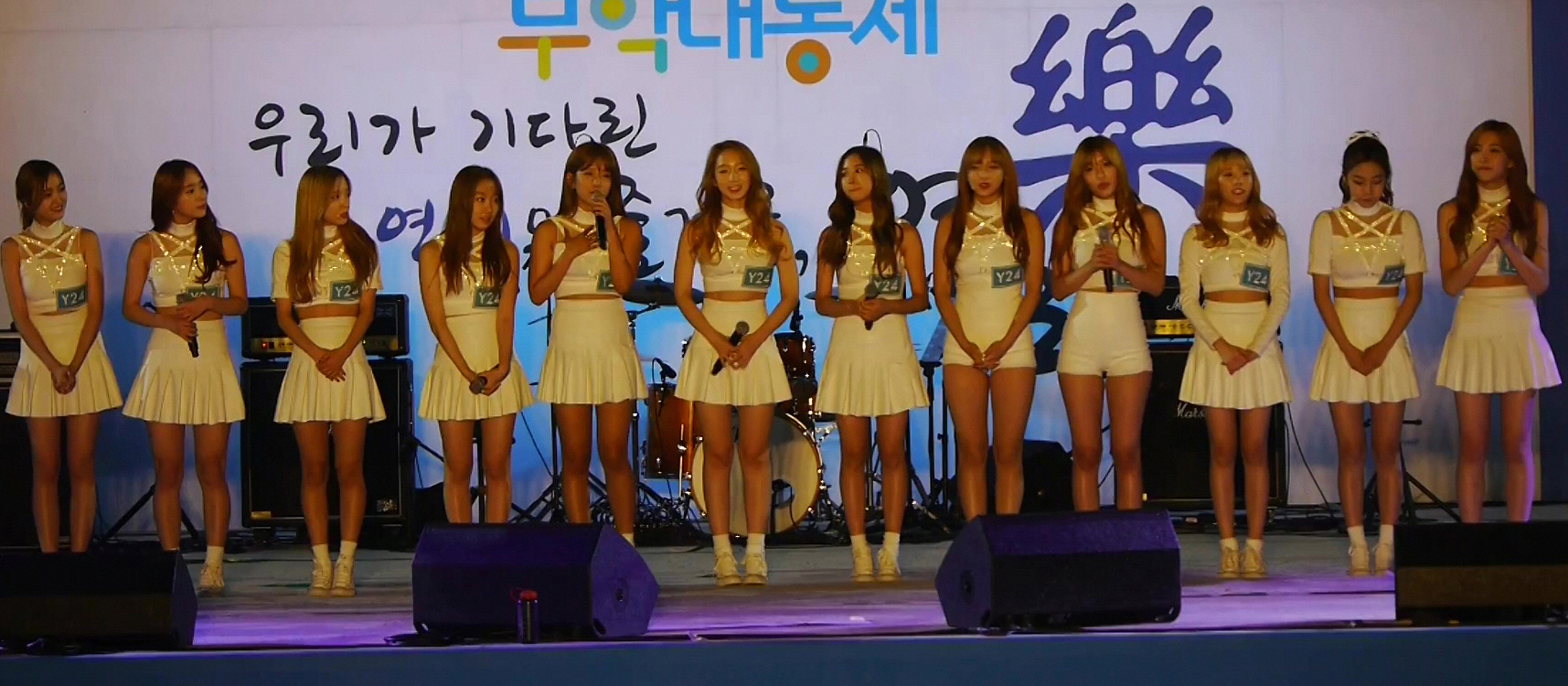 (FHD) 20160520 연세대 대동제 폐막식 우주소녀 - 멘트